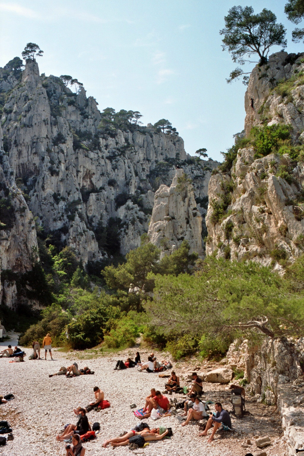 Calanque d'En-Vau près de Marseille